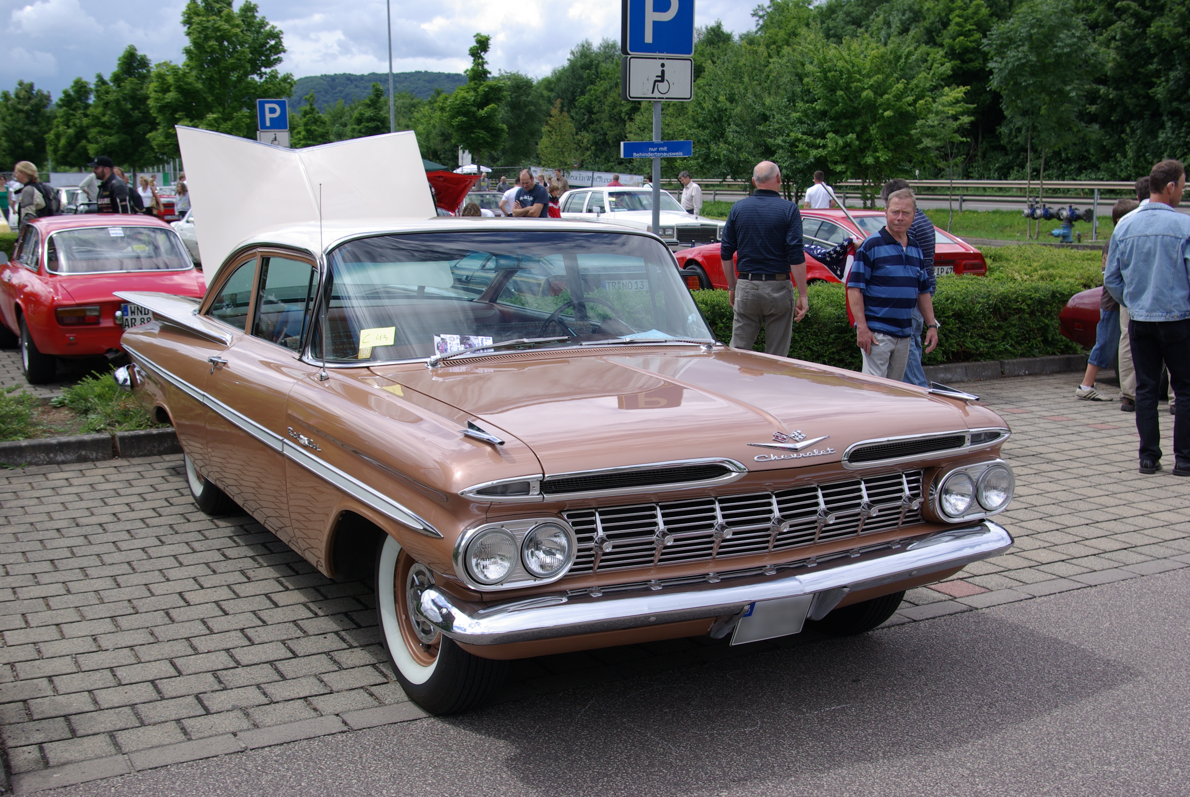 Chevrolet Bel Air Baujahr 1959 Leistung 270 PS